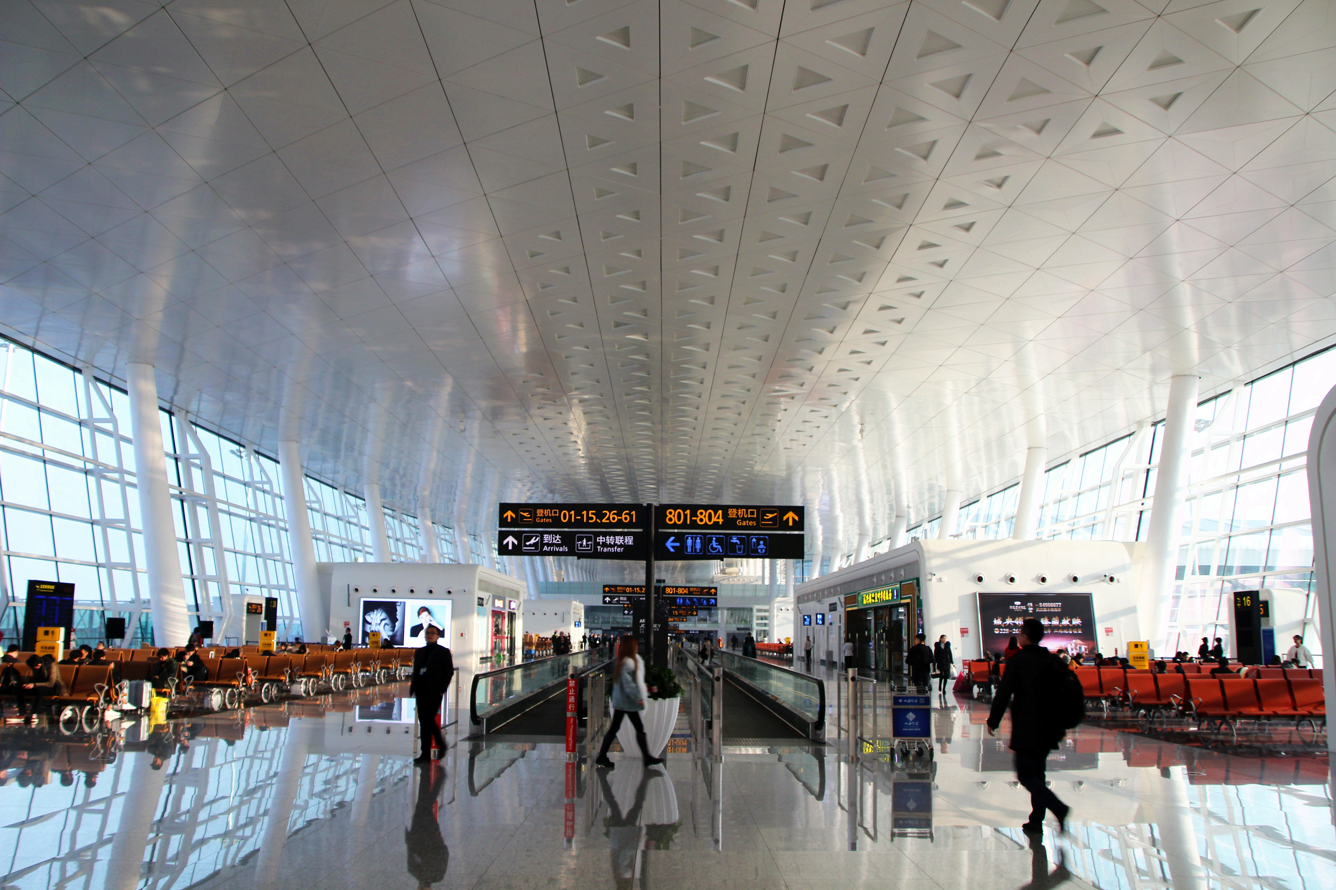 武汉天河国际机场T3航站楼